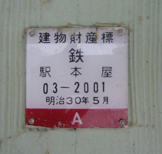 2010年2月28日、ISEPO（投稿者）が撮影 Station Building marking on Toide Station, Takaoka City, Toyama Perf., Japan